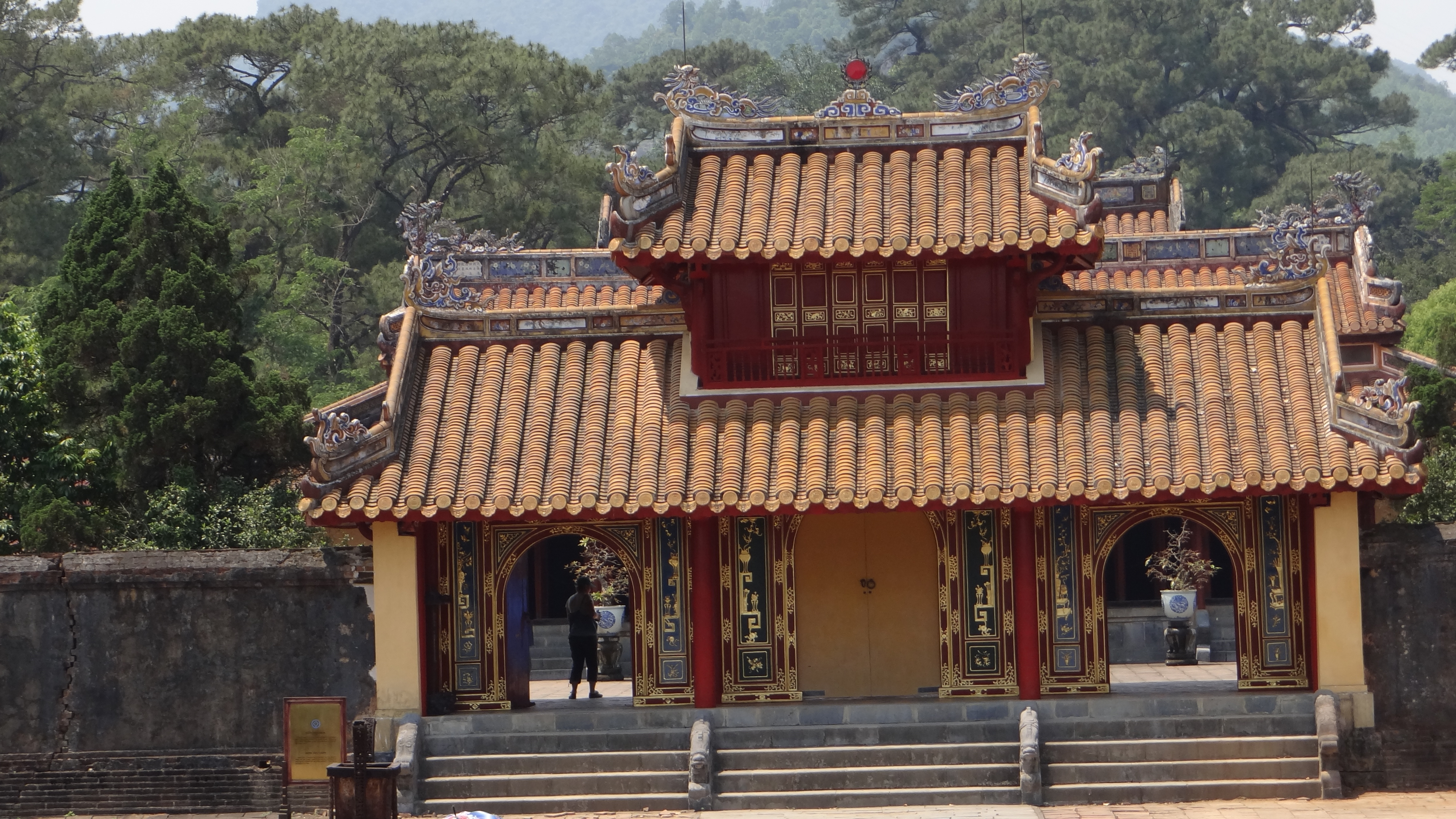 Lăng Minh Mạng in Hương Thọ, Huong Tra District, Thừa Thiên-Huế, Vietnam